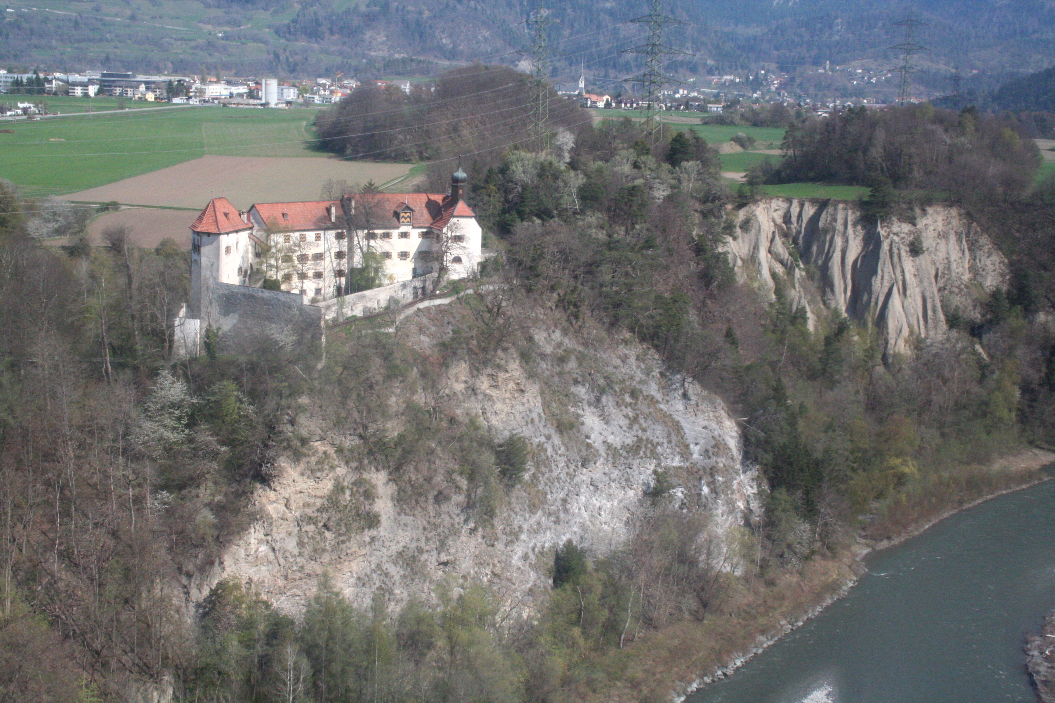 Schloss Rhäzüns